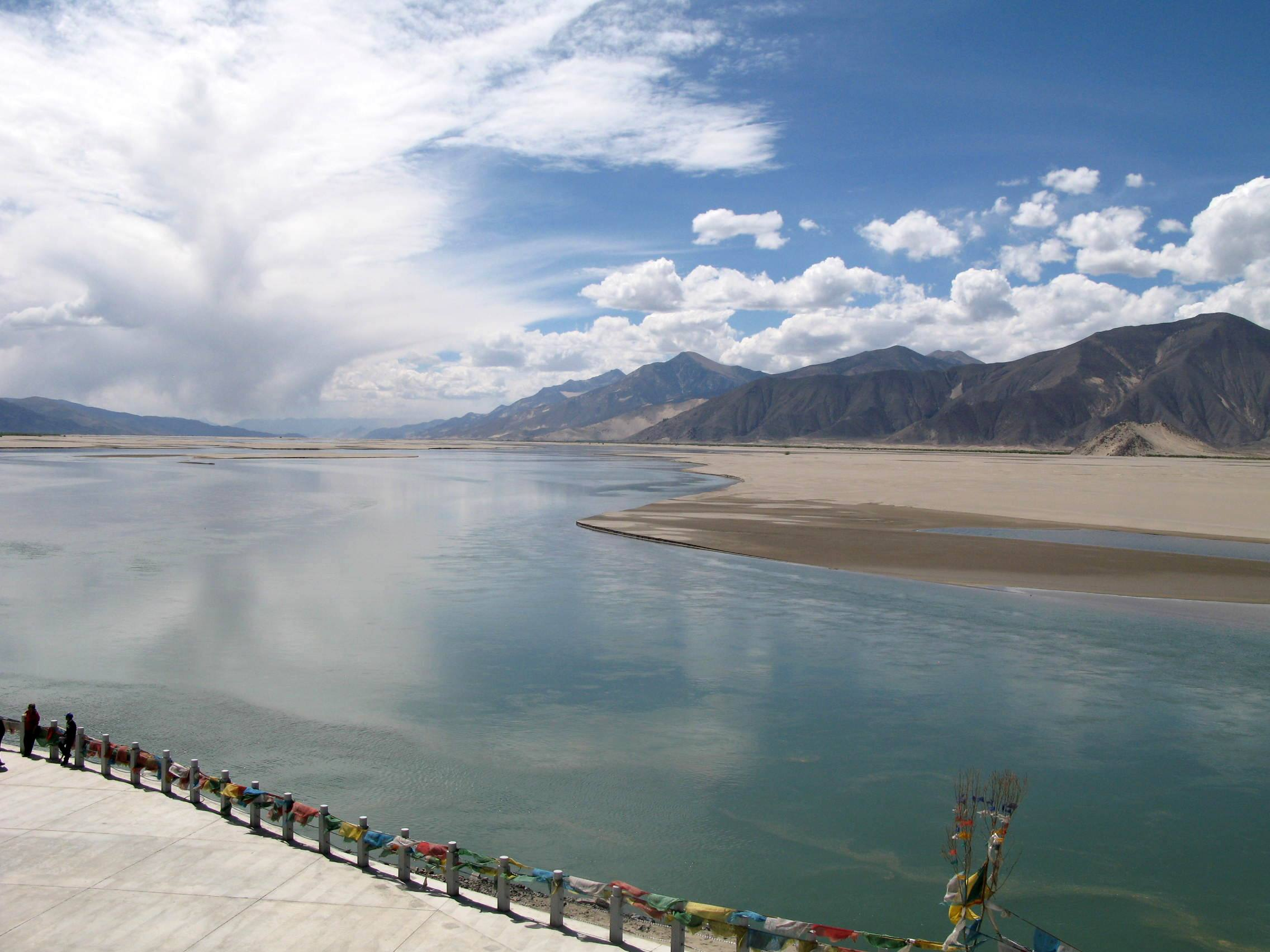 Pogled na reko Yarlung Tsangpo v bližini Tsedanga, Tibet